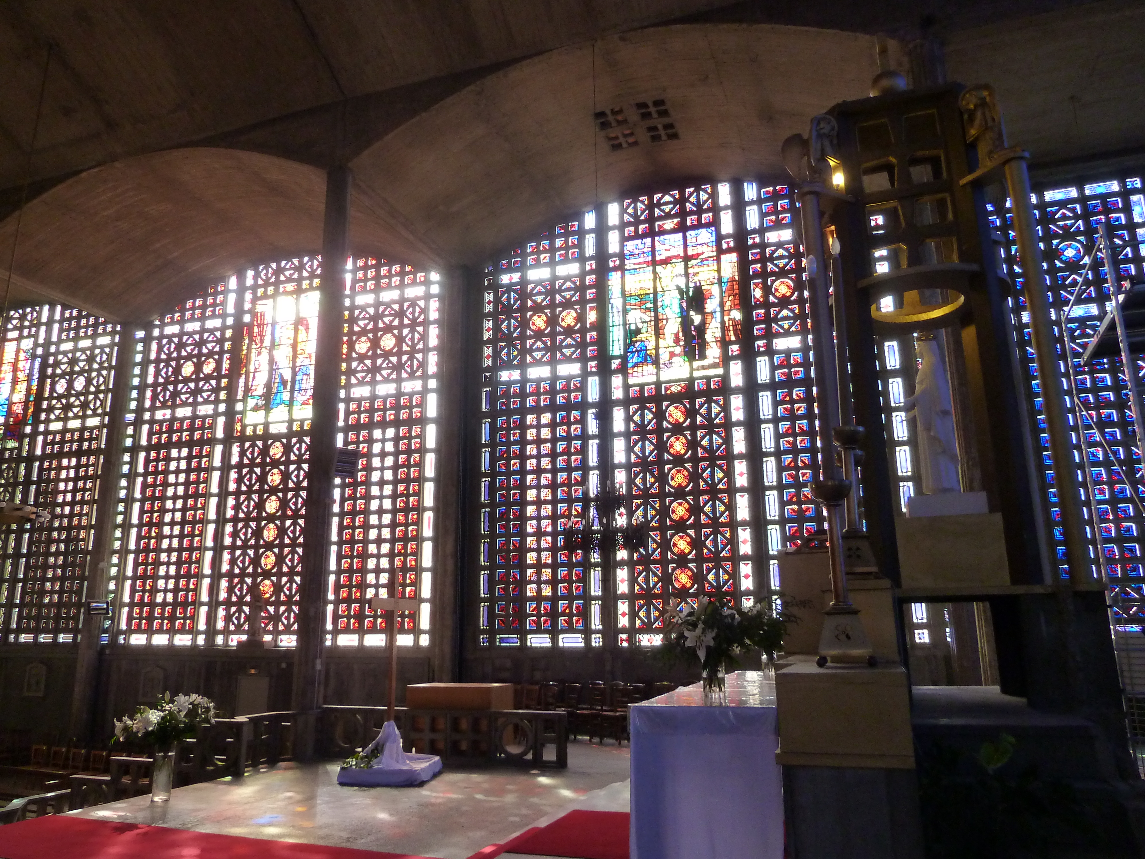 Église Notre-Dame du Raincy - Le Raincy - Seine-Saint-Denis - France - Mérimée PA00079948 .